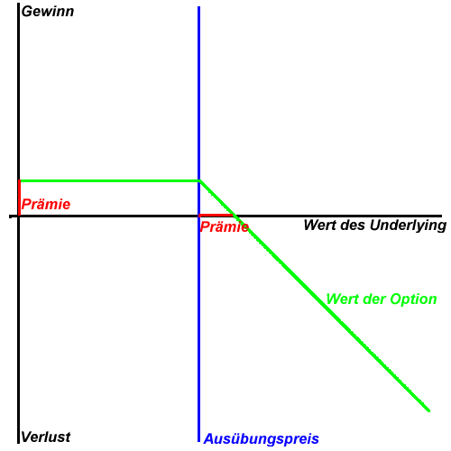 Short call: Auszahlungsdiagramm